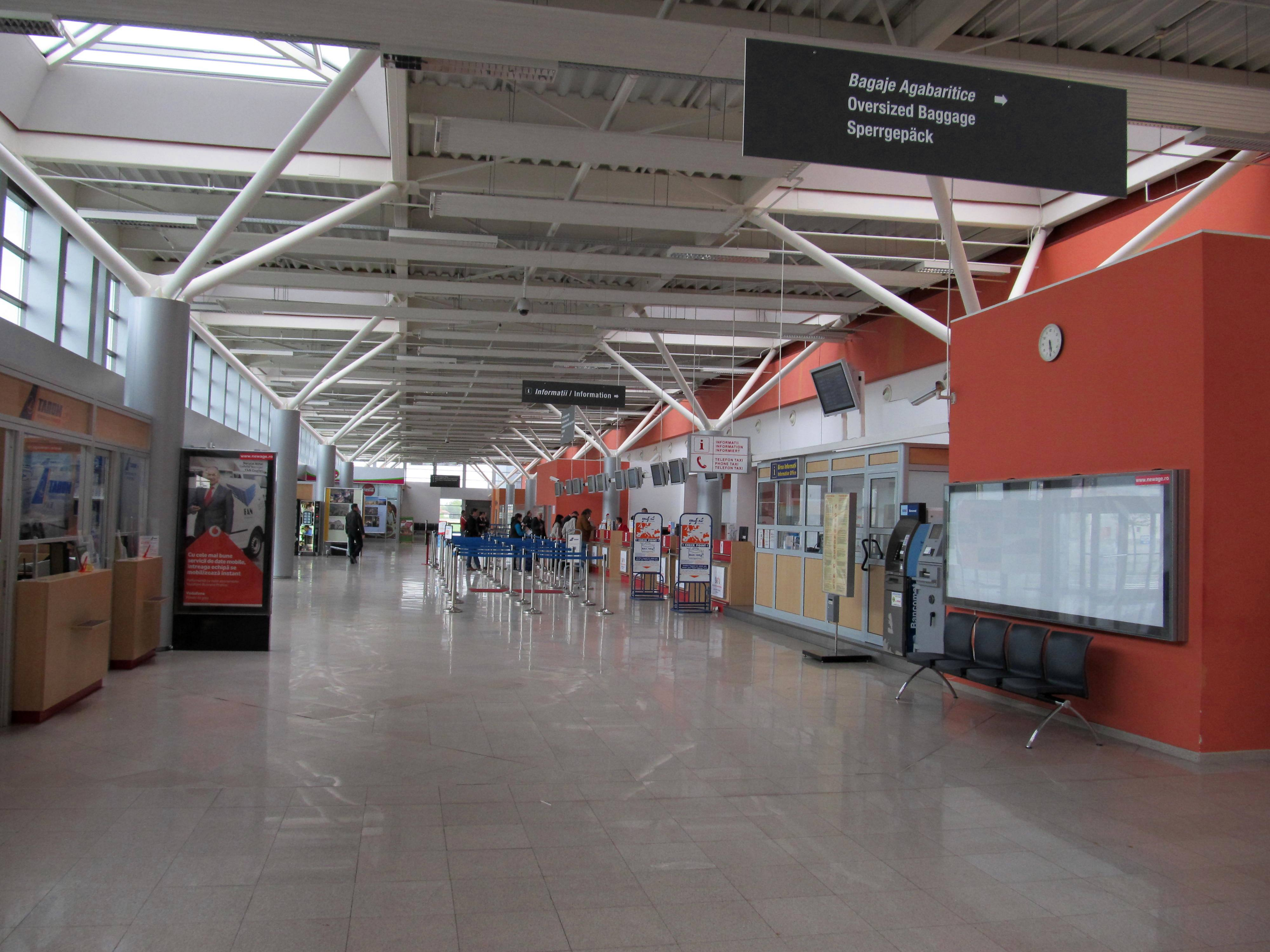 Flughafen Hermannstadt